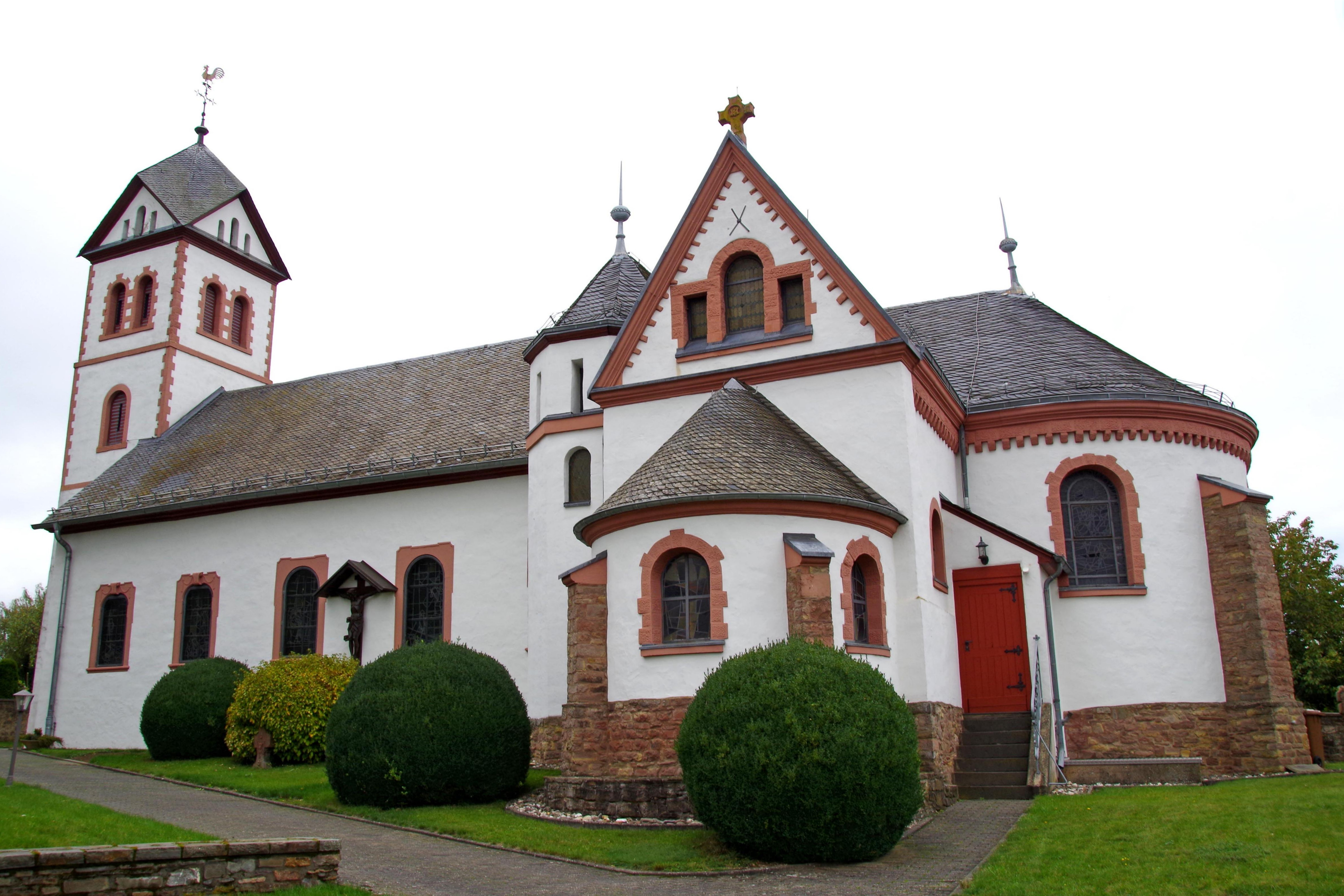 St. Gertrud (Bouderath), Südseite